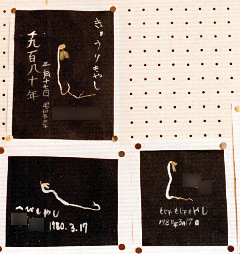 キミ子方式で書いたモヤシの絵。1980年。中学校。